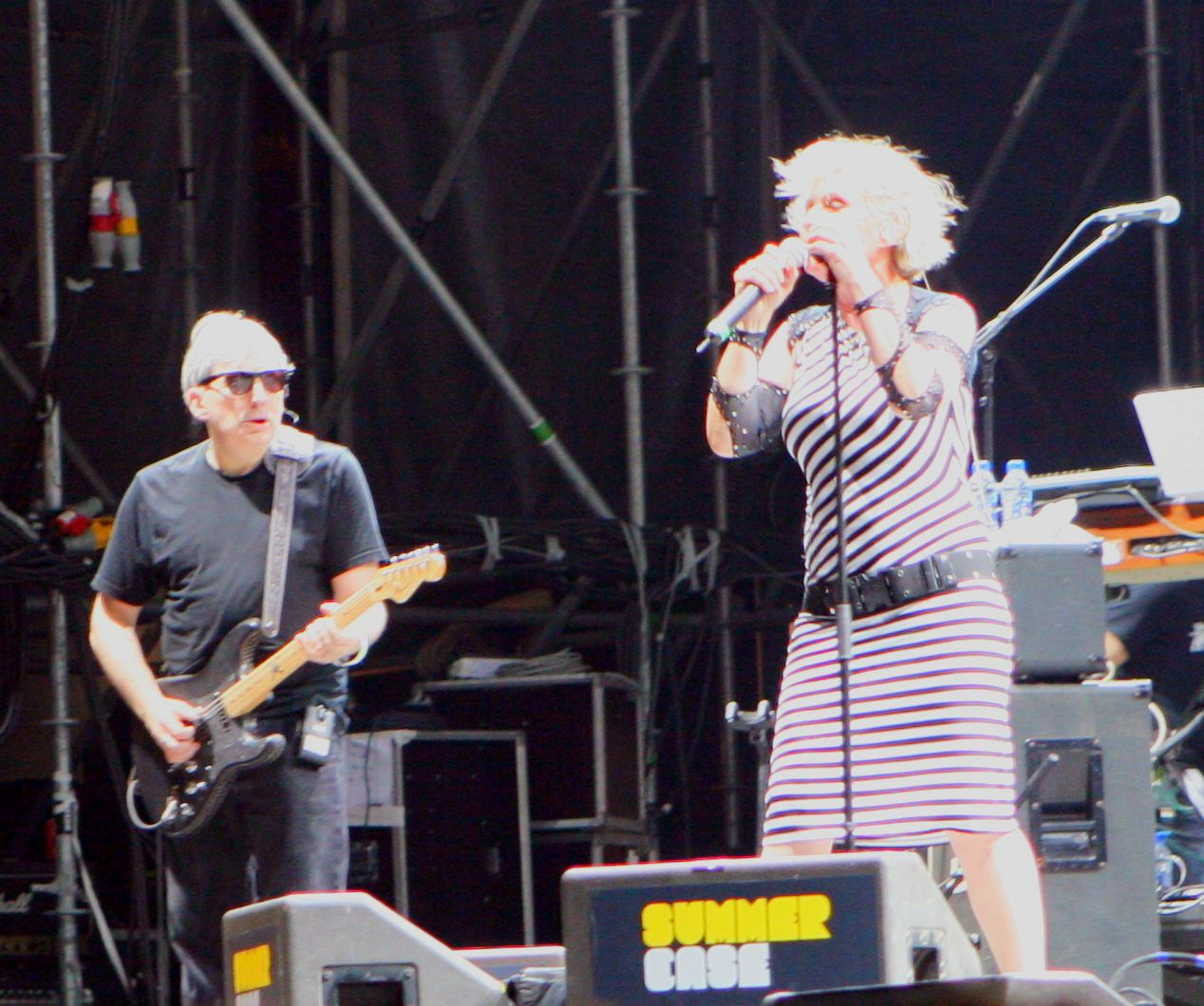 Podéis leer una crónica de todo el Summercase en nuestra web (You can read an account of all our Summercase site).